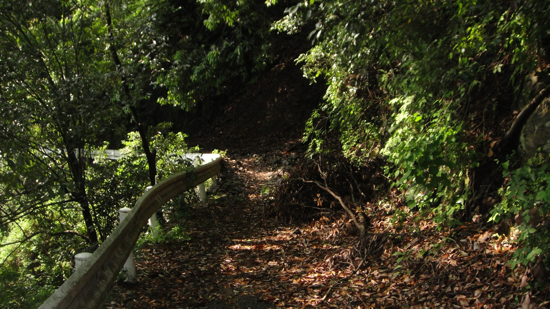 神奈川県道515号